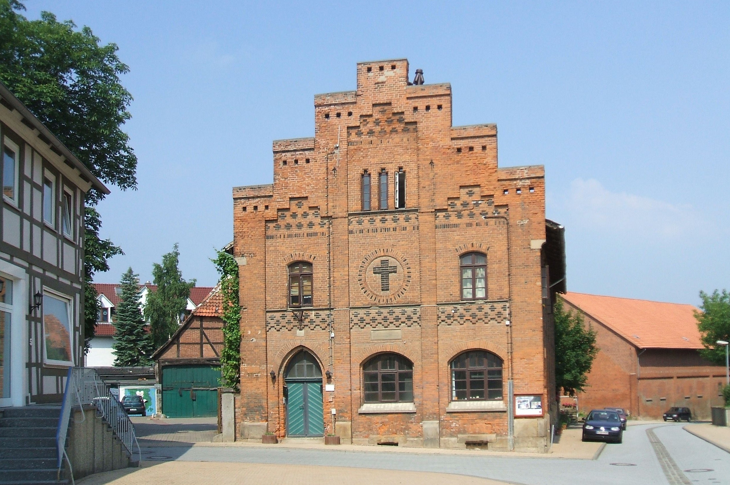 Springe, OT Gestorf, In der Welle 7, das Haus befindet sich gegenüber der Kirche. Es ist die ehemalige Schule. De Plan stammt von Conrad Wilhelm Hase.